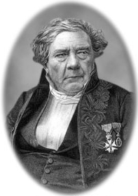 French physicist Jacques Babinet (1794-1872)